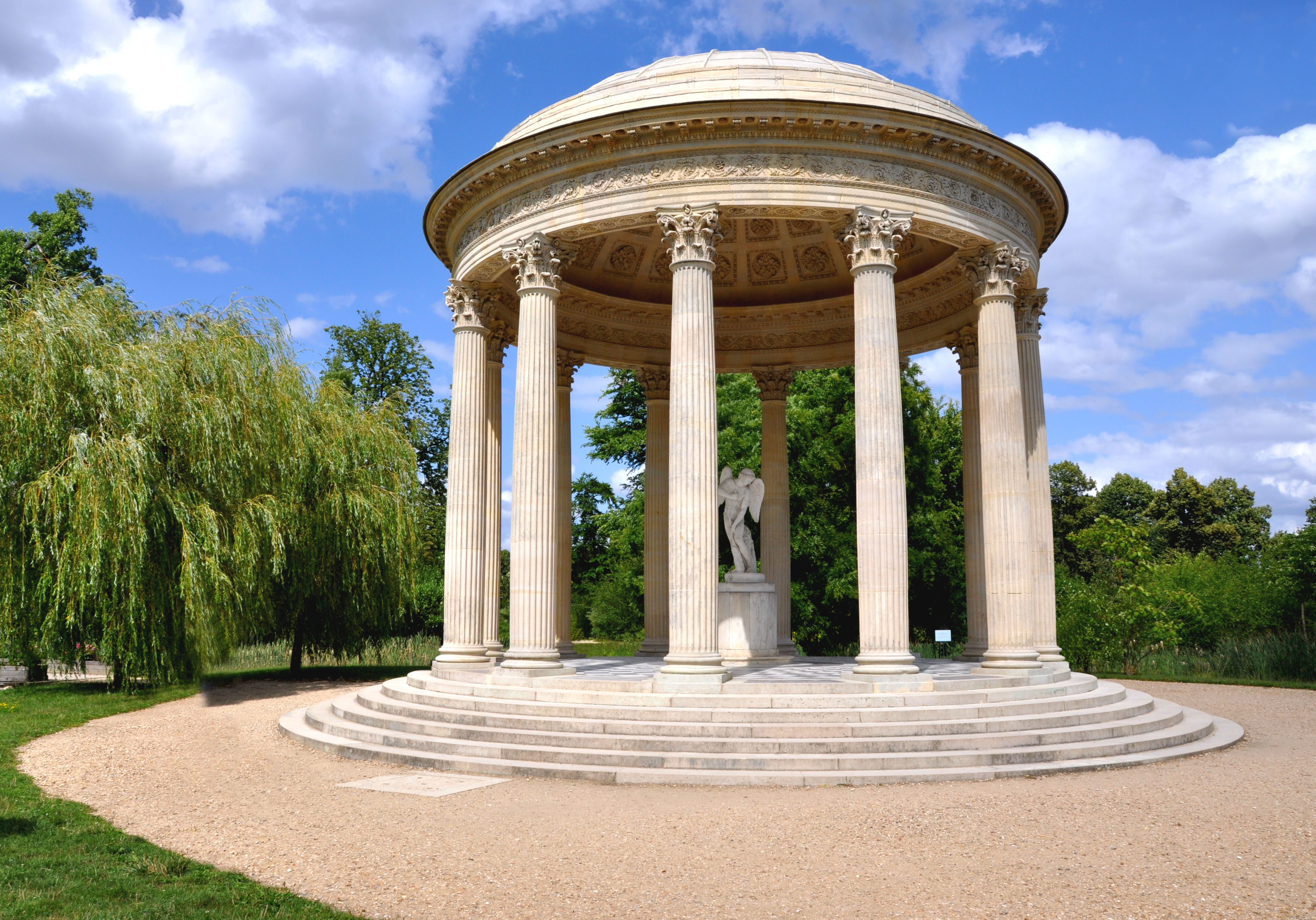 Temple de l'Amour au Petit Trianon